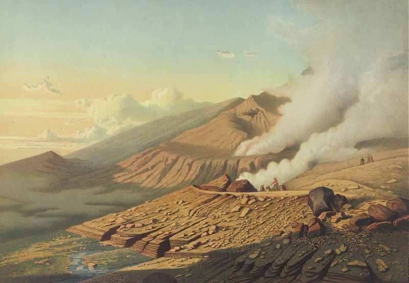 Litho. Pagina 1 van de map "De Indische Archipel", Den Haag, 1865-1876, met daarin 24 kleurenlitho's, van objectnummers 3728-430 t/m 3728-479.. De krater van de vulkaan Papandajan